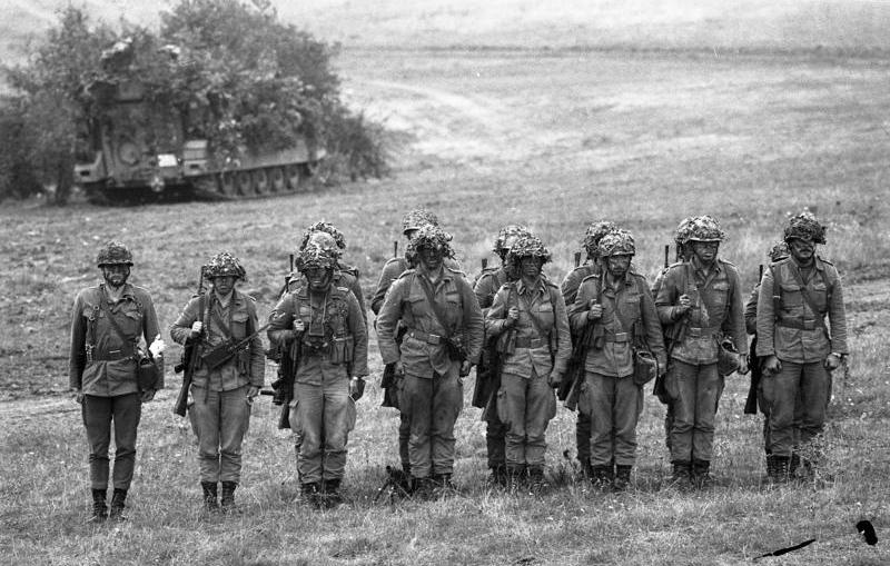 23.9.1986 Mitarbeiter des Bundespresseamtes beobachten das Herbstmanöver "Fränkischer Schild" der Bundeswehr - mit Beteiligung zahlreicher Soldaten aus NATO-Mitgliederstaaten sowie eines französischen Großverbandes - im Raum Würzburg.